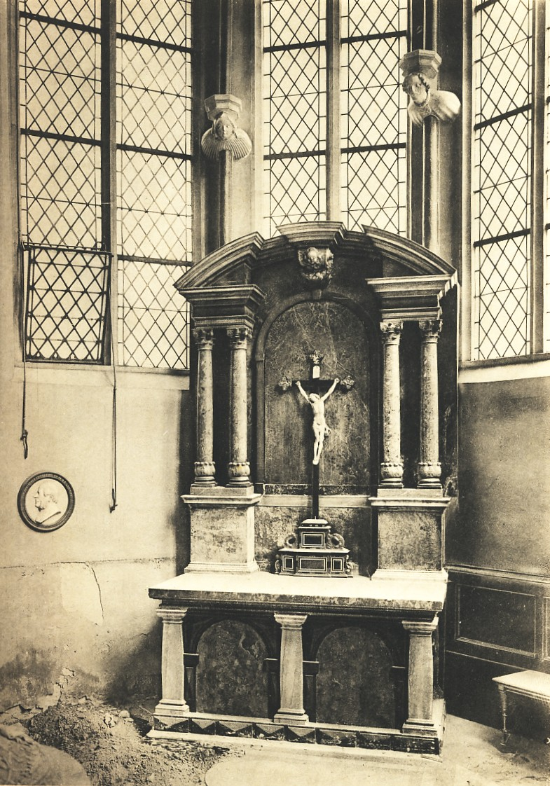 Altar der Schlosskapelle, seit 1737 in der Busmannkapelle der Sophienkirche in Dresden